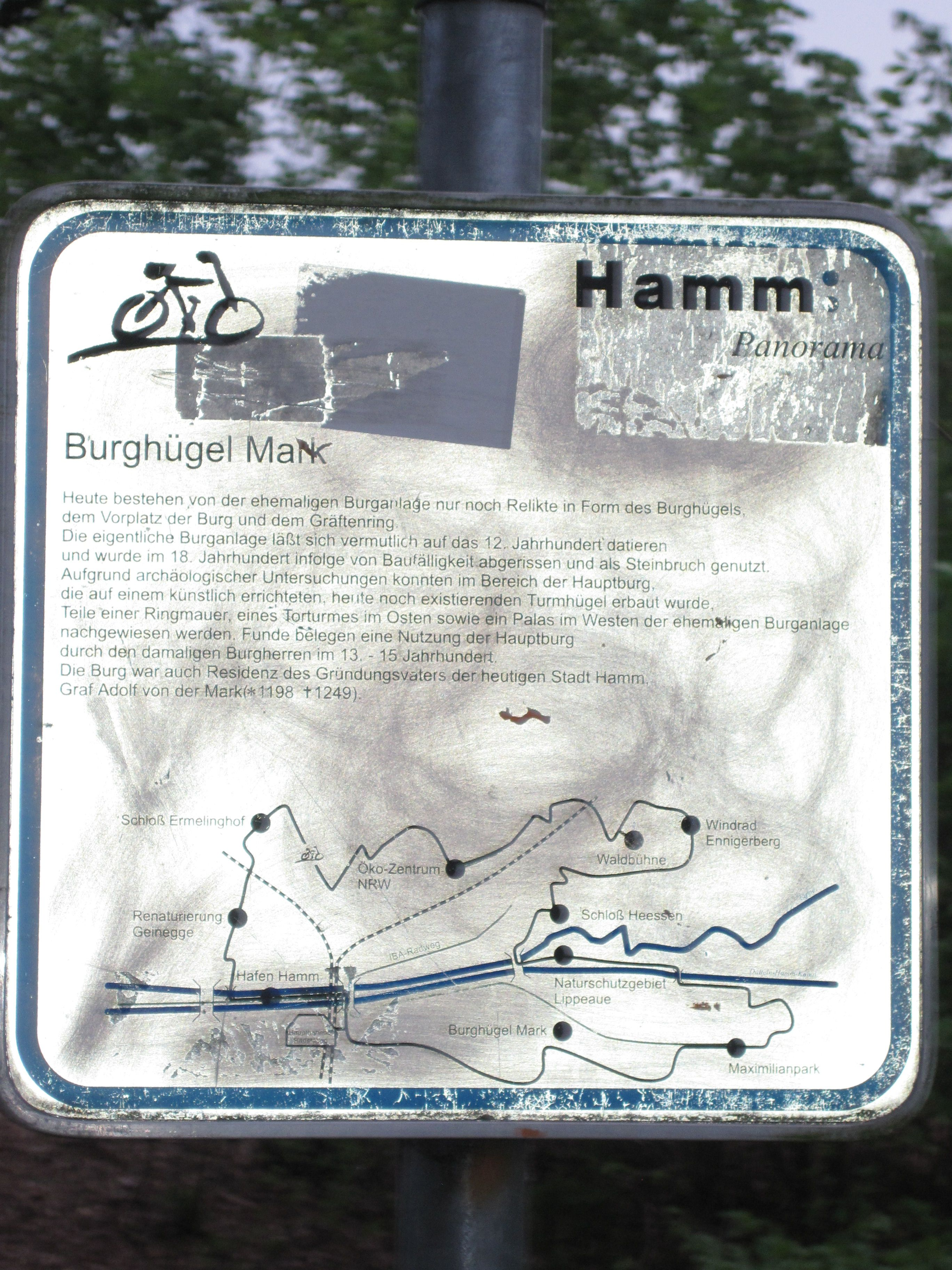 Dieses Foto zeigt eine Informationstafel im Eingagsbereich des Burghügels zur Mark in Hamm.